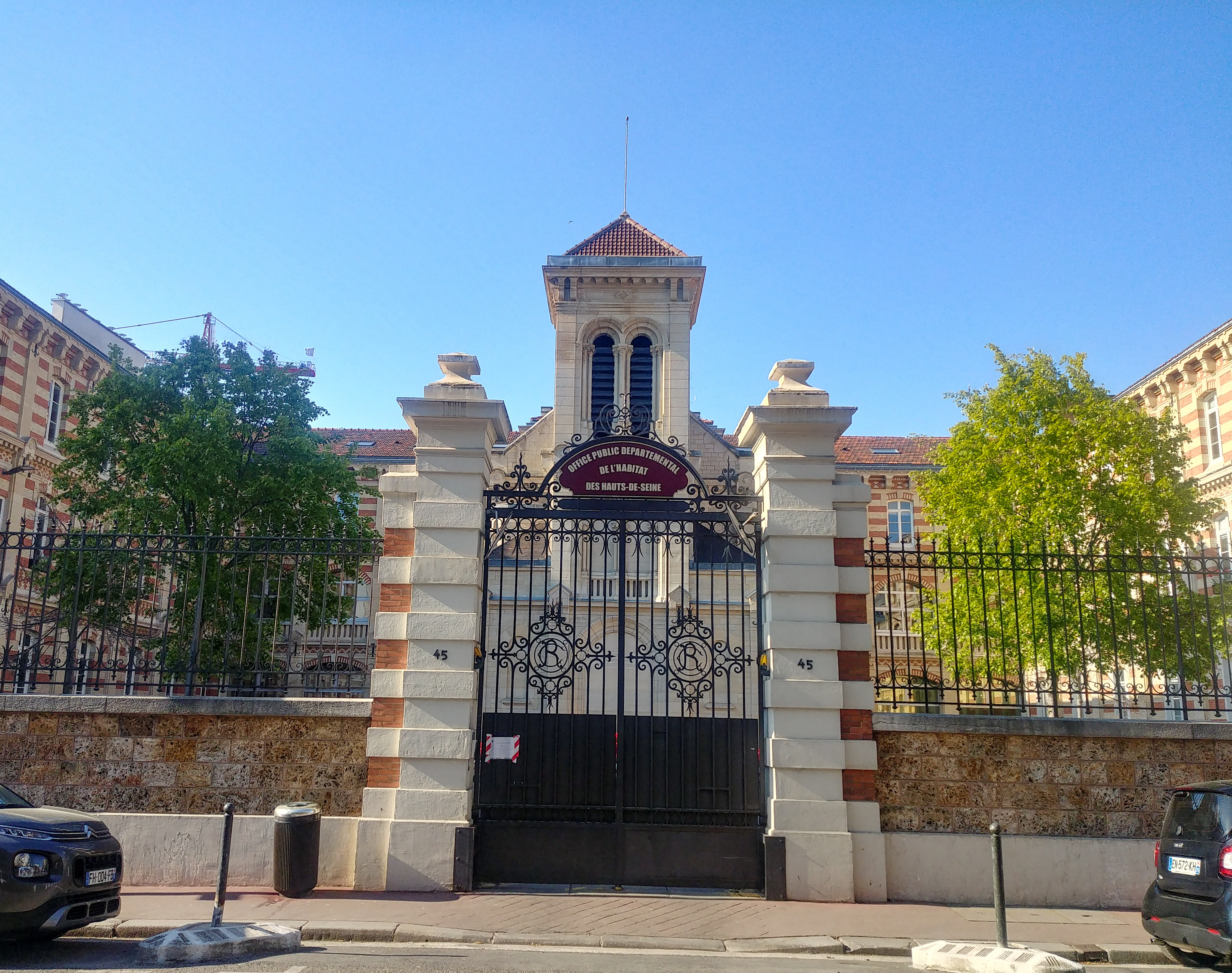 Office public de l'habitat des Hauts-de-Seine Ancienne chapelle de l'Hospice Antonin Raynaud